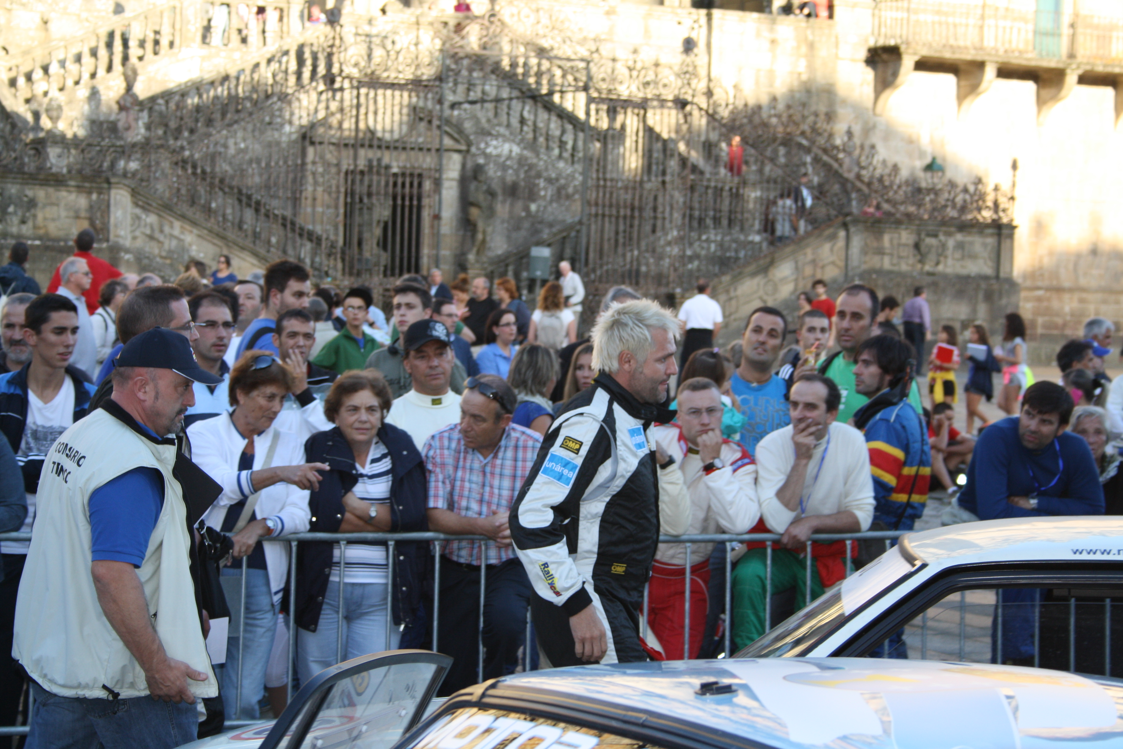 Santiago Cañizares en 2012.